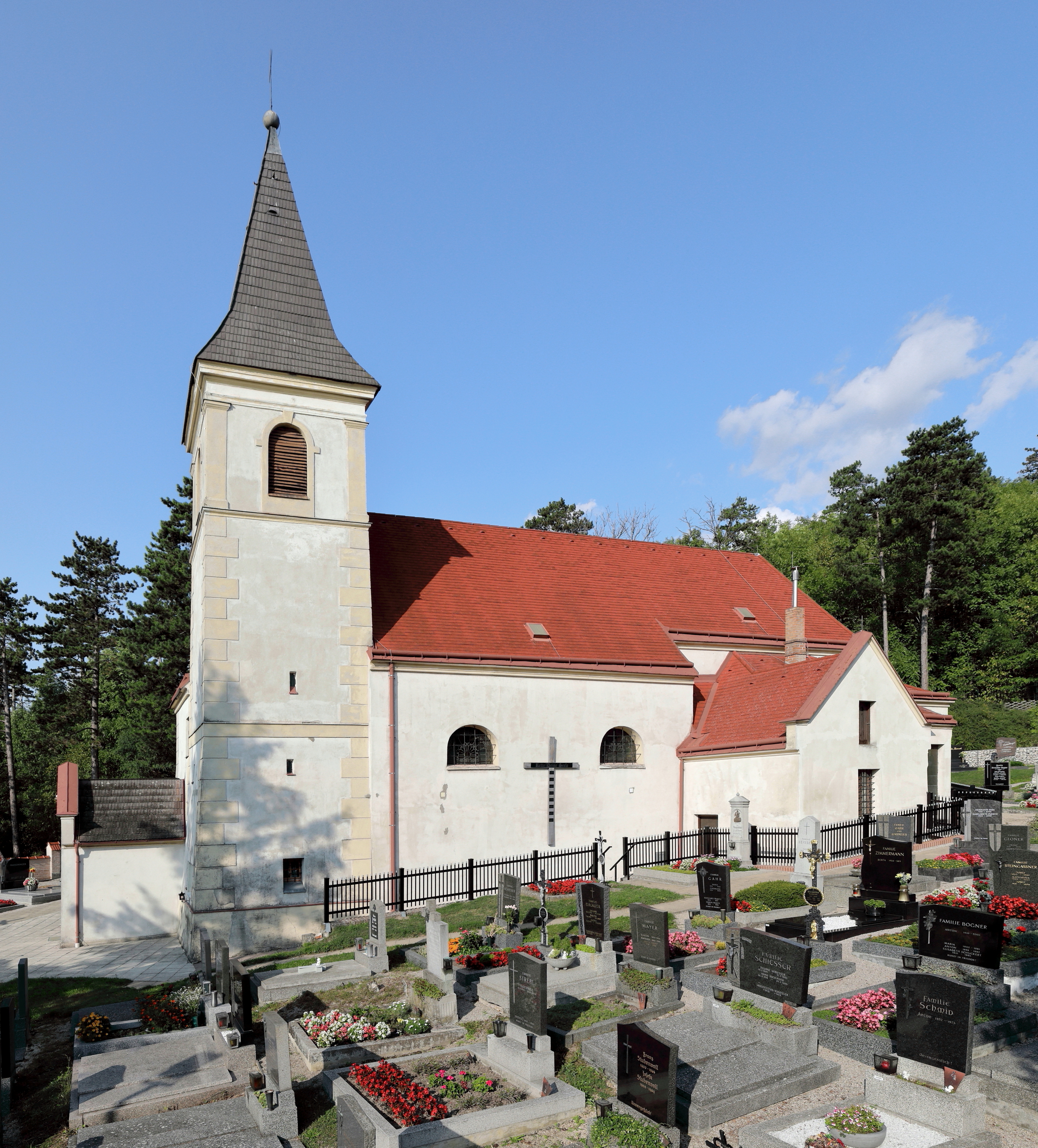 Südwestansicht der röm.-kath. Pfarrkirche hl. Oswald in Hörersdorf, ein Ortsteil der niederösterreichischen Bezirkshauptstadt Mistelbach. Ein im Kern gotischer Sakralbau, der um 1700 barockisiert wurde.